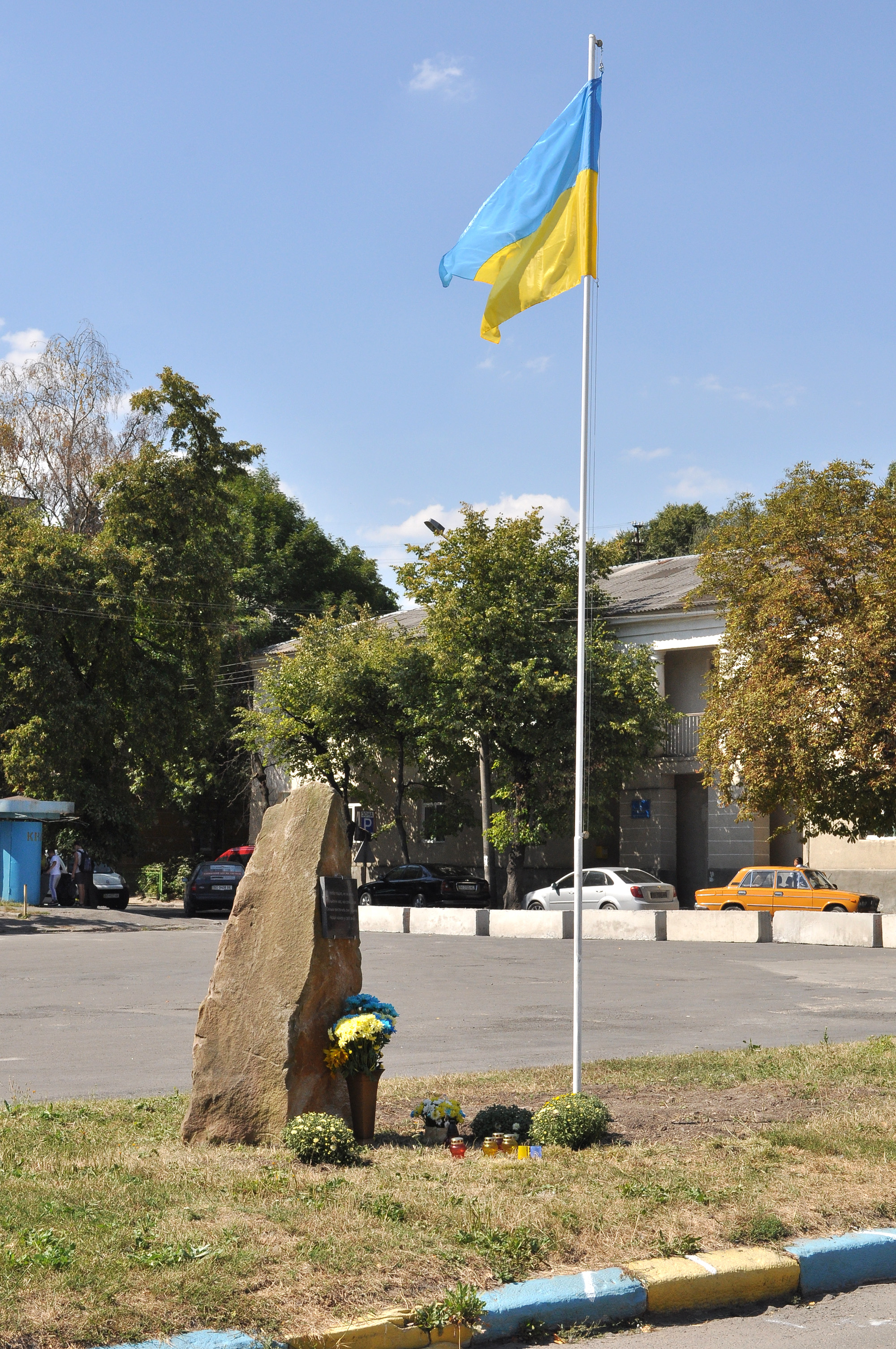 Камінь-нагадування на місці майбутнього пам'ятника Небесній сотні на Площі Героїв Євромайдану в Тернополі.